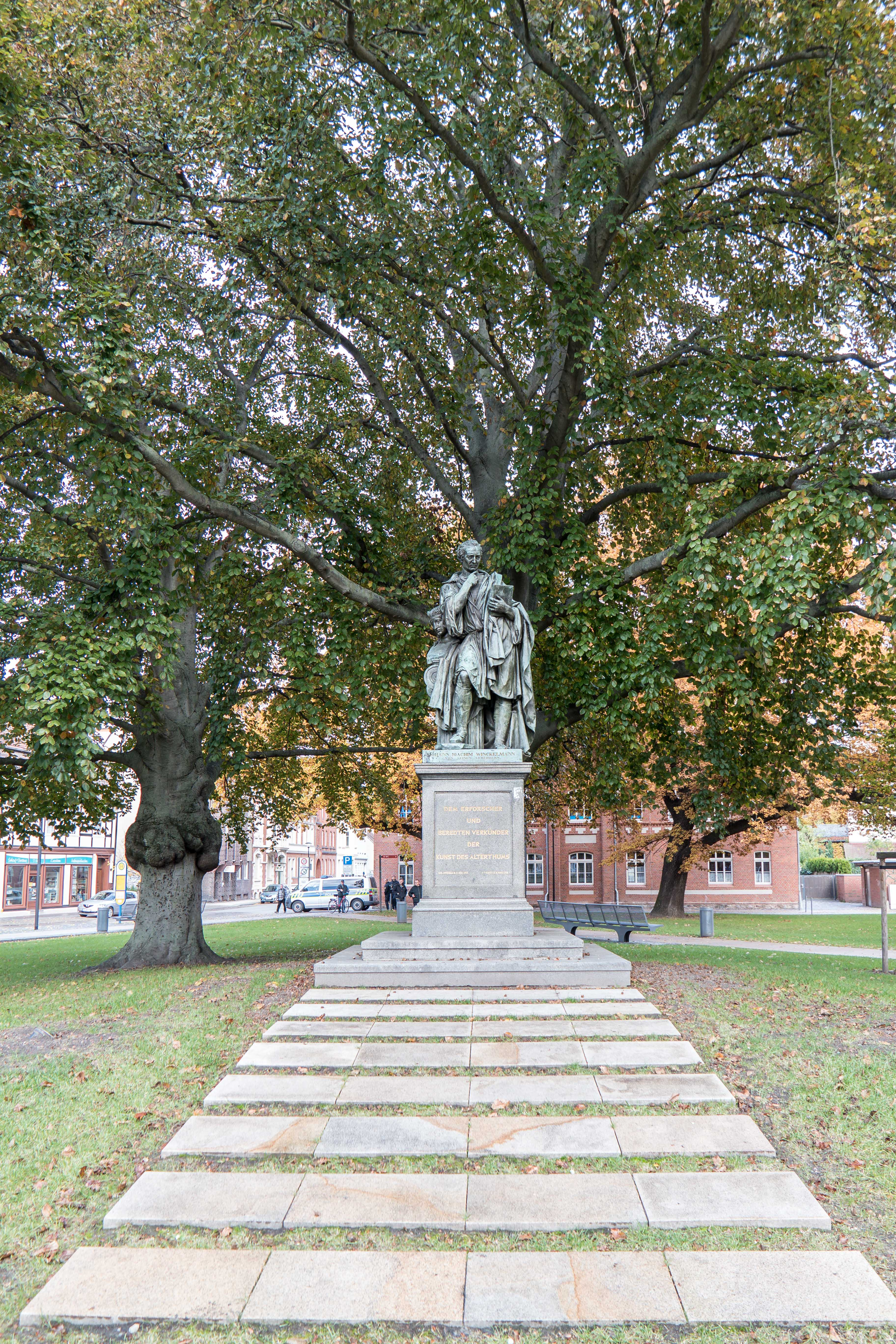 Denkmal für Johann Joachim Winckelmann in Stendal